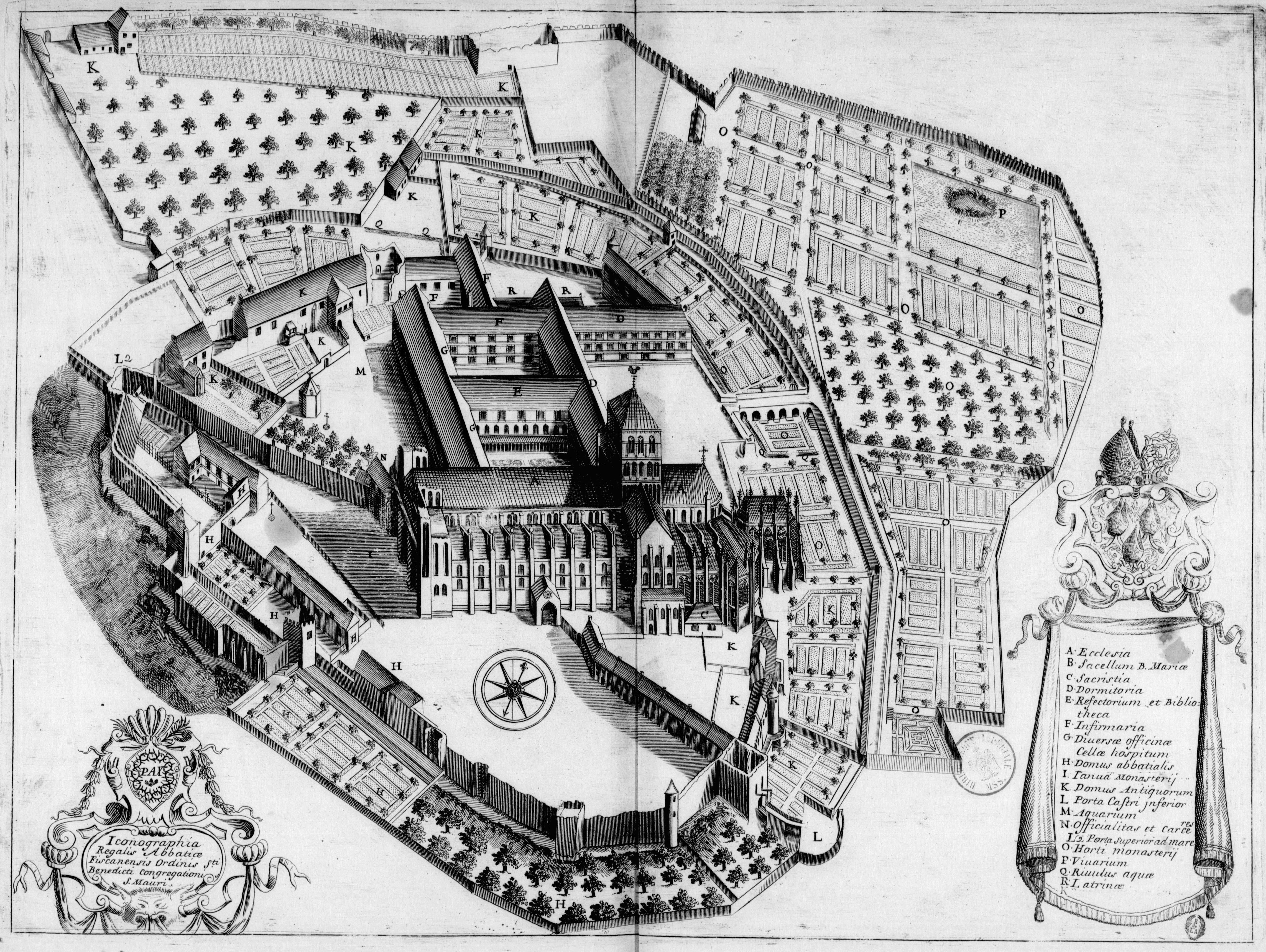 Planche gravée du 17ème siècle représentant l'abbaye de la Trinité de Fécamp, dans le livre Monasticon Gallicanum.